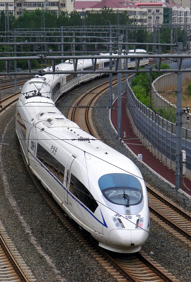 CRH3C型动车组担当的C2226次驶离天津站，进入京津城际铁路